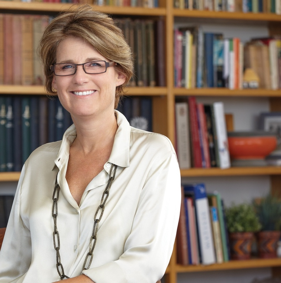 פרופסור גילי דרורי